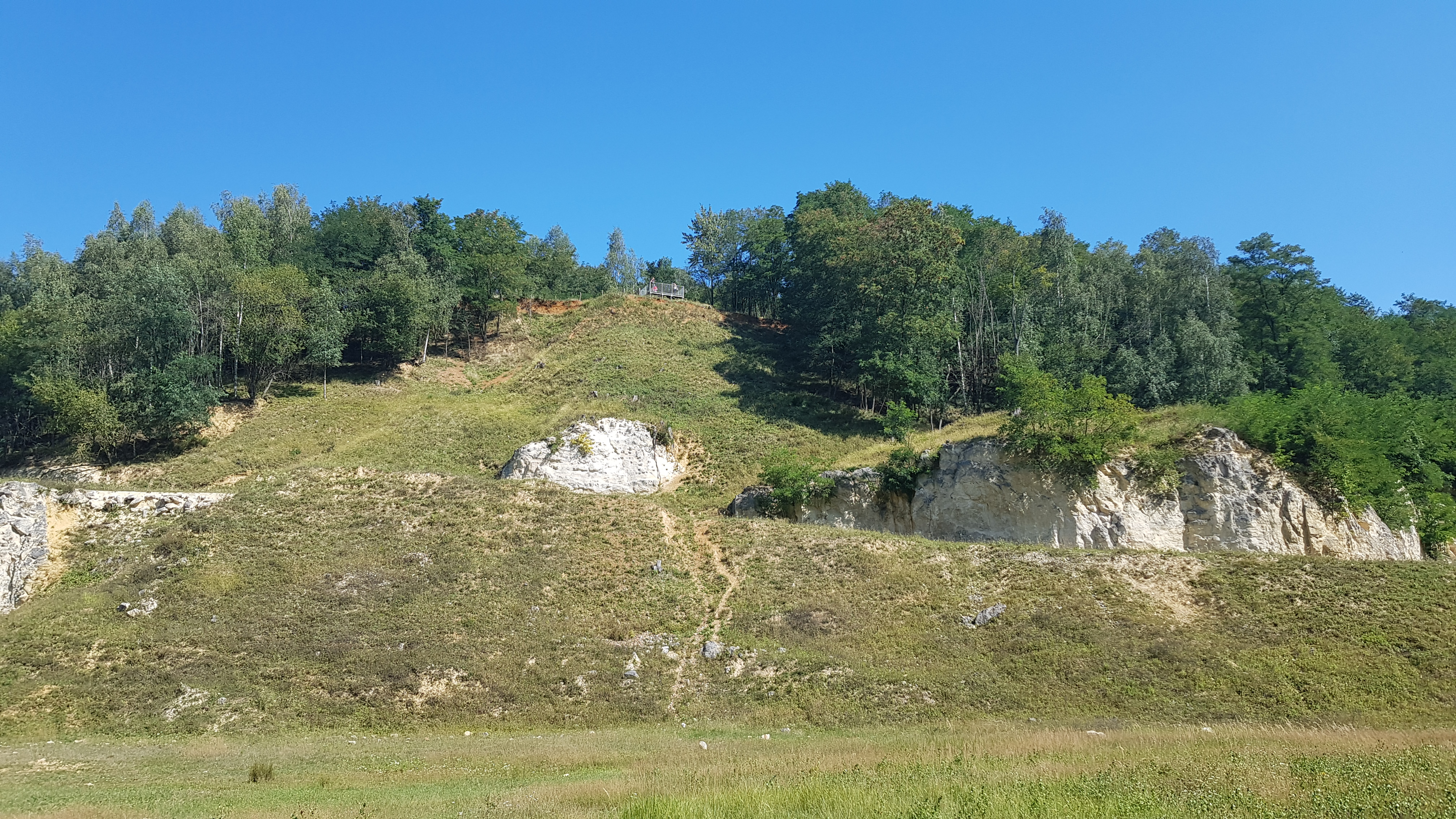 Curfsgroeve, Geulhem, Nederland